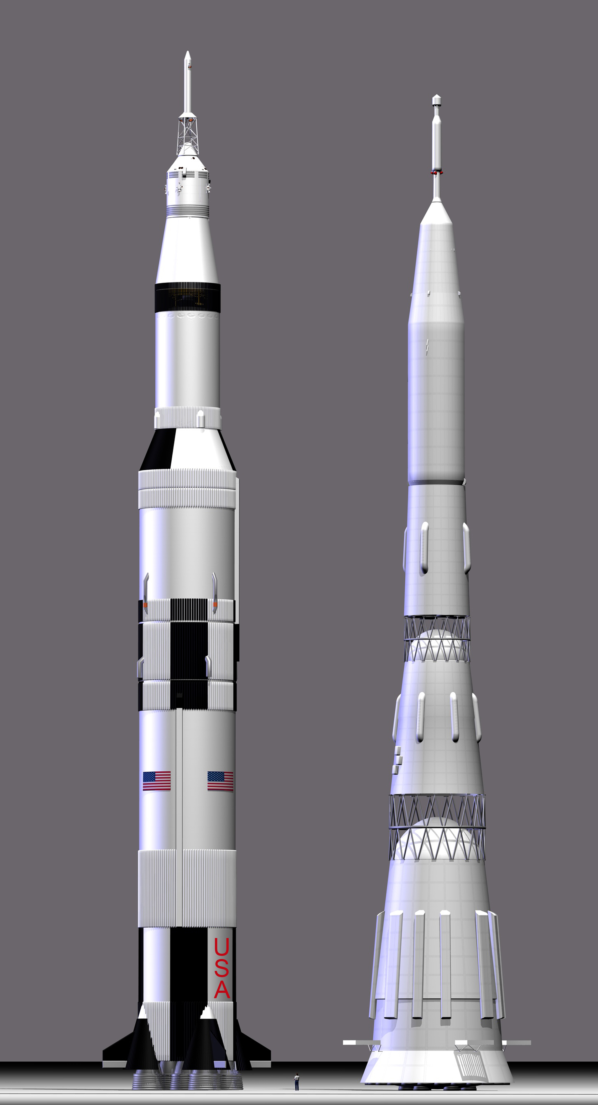 Größenvergleich der amerikanischen- und sowjetischen Mondraketen